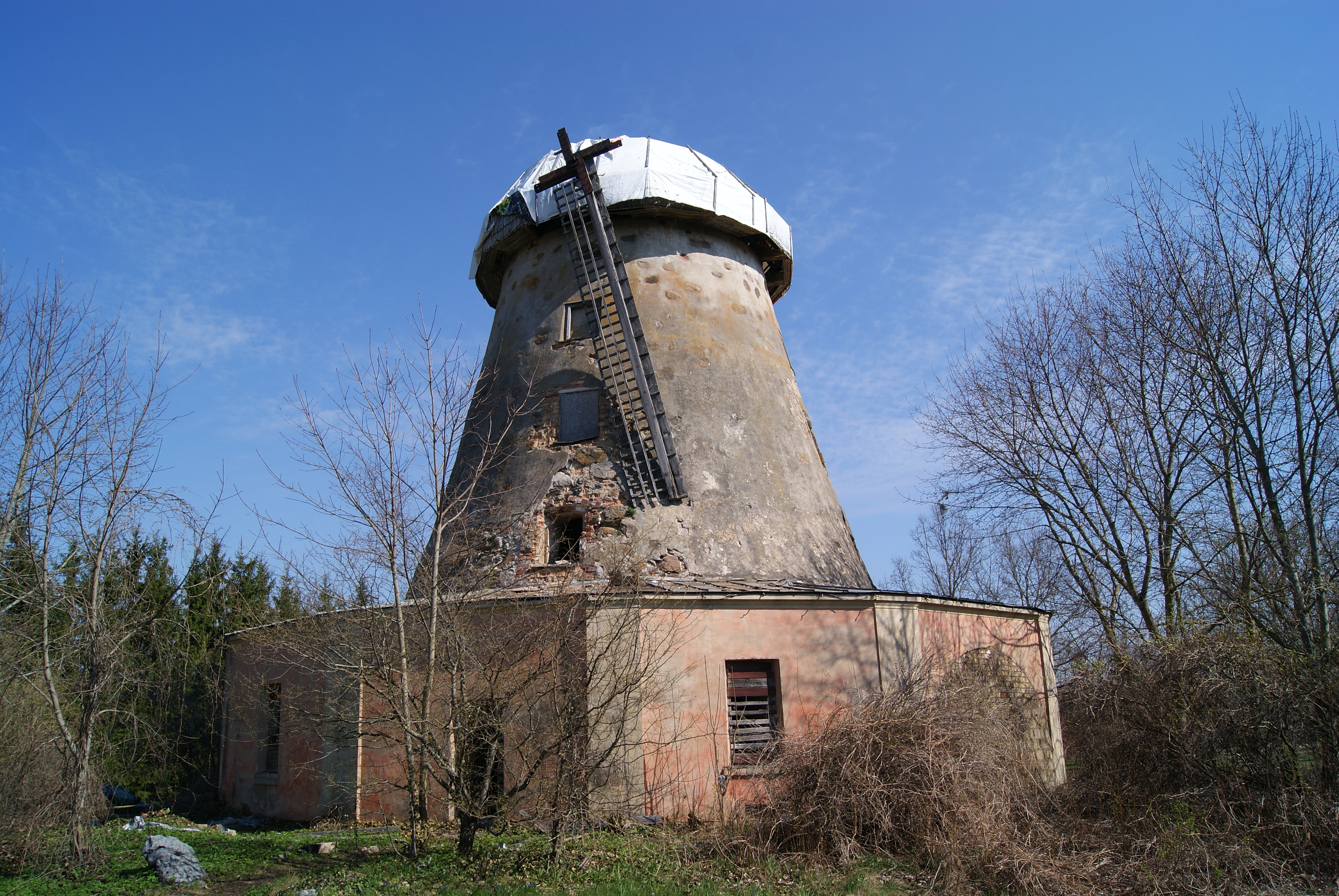 Žagariškiai, Lithuania